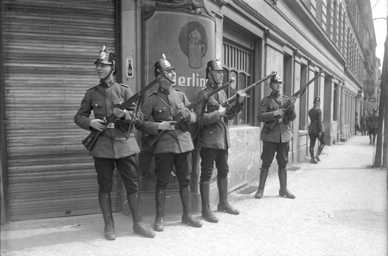 Die blutigen Mai-Unruhen in Berlin! Schussbereite Polizeiposten in den Strassen Neuköllns beobachten gegenüberliegende Häuser auf Fenster und Dachschützen.